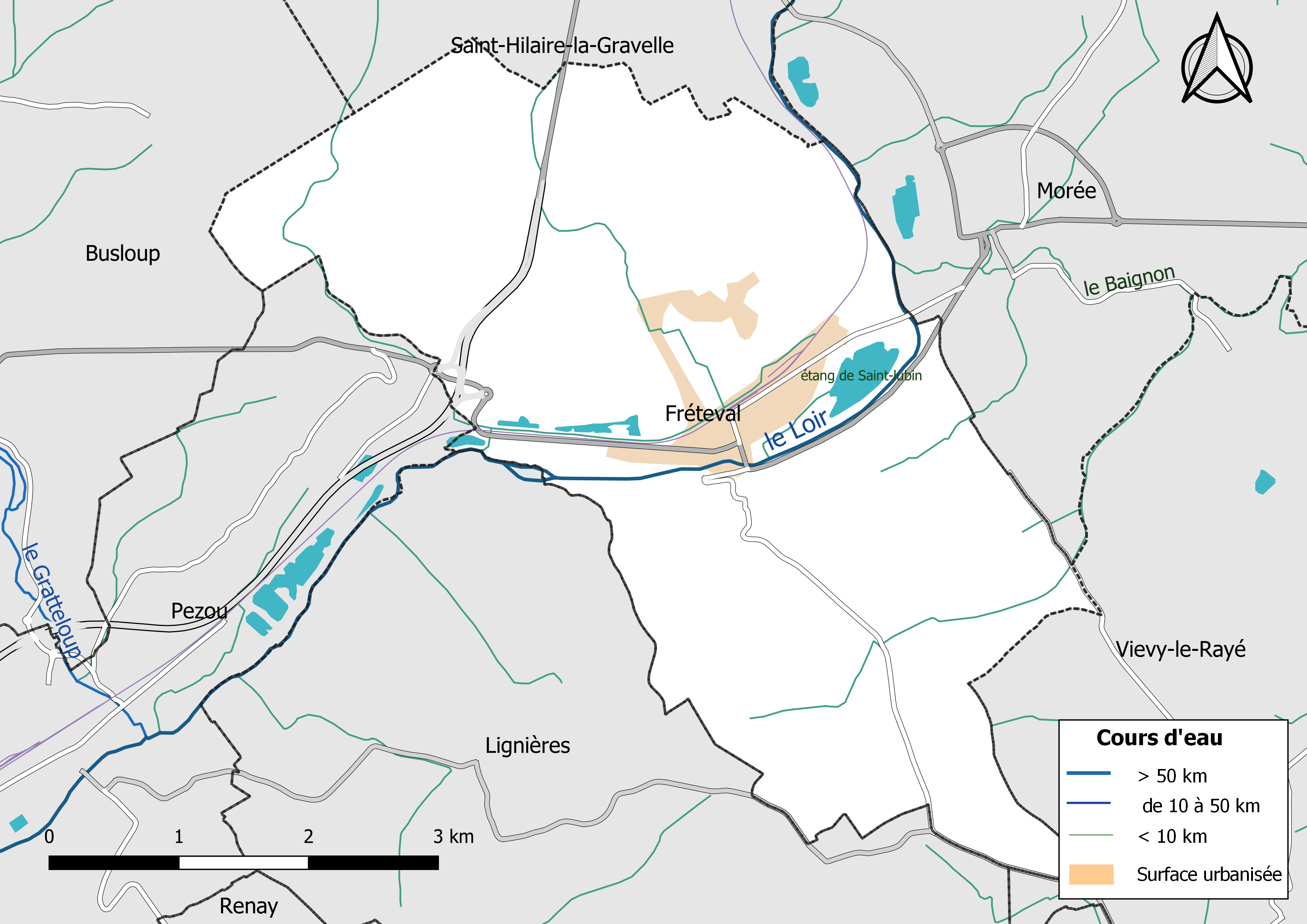 Carte du réseau hydrographique de la commune de Fréteval (Loir-et-Cher, France).